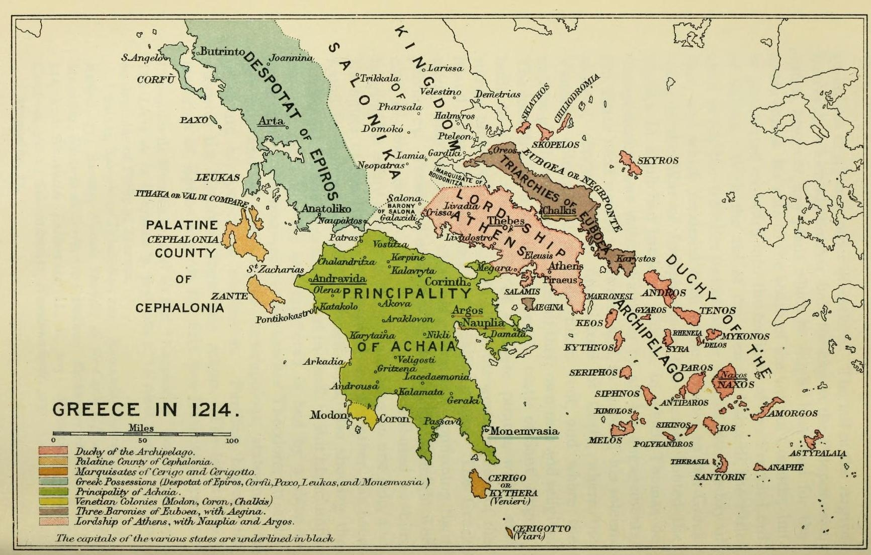 Grecia en 1214.